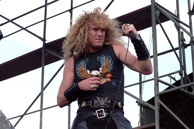 Rhett Forrester au Breaking Sound Festival du Bourget, 29-30 août 1984.